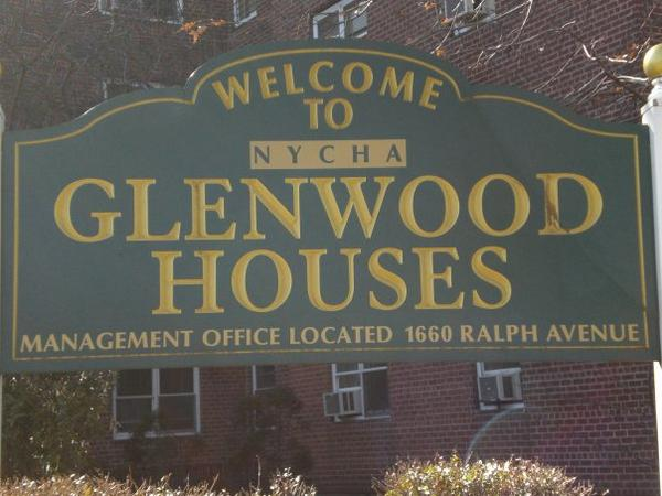 glenwoodprojects